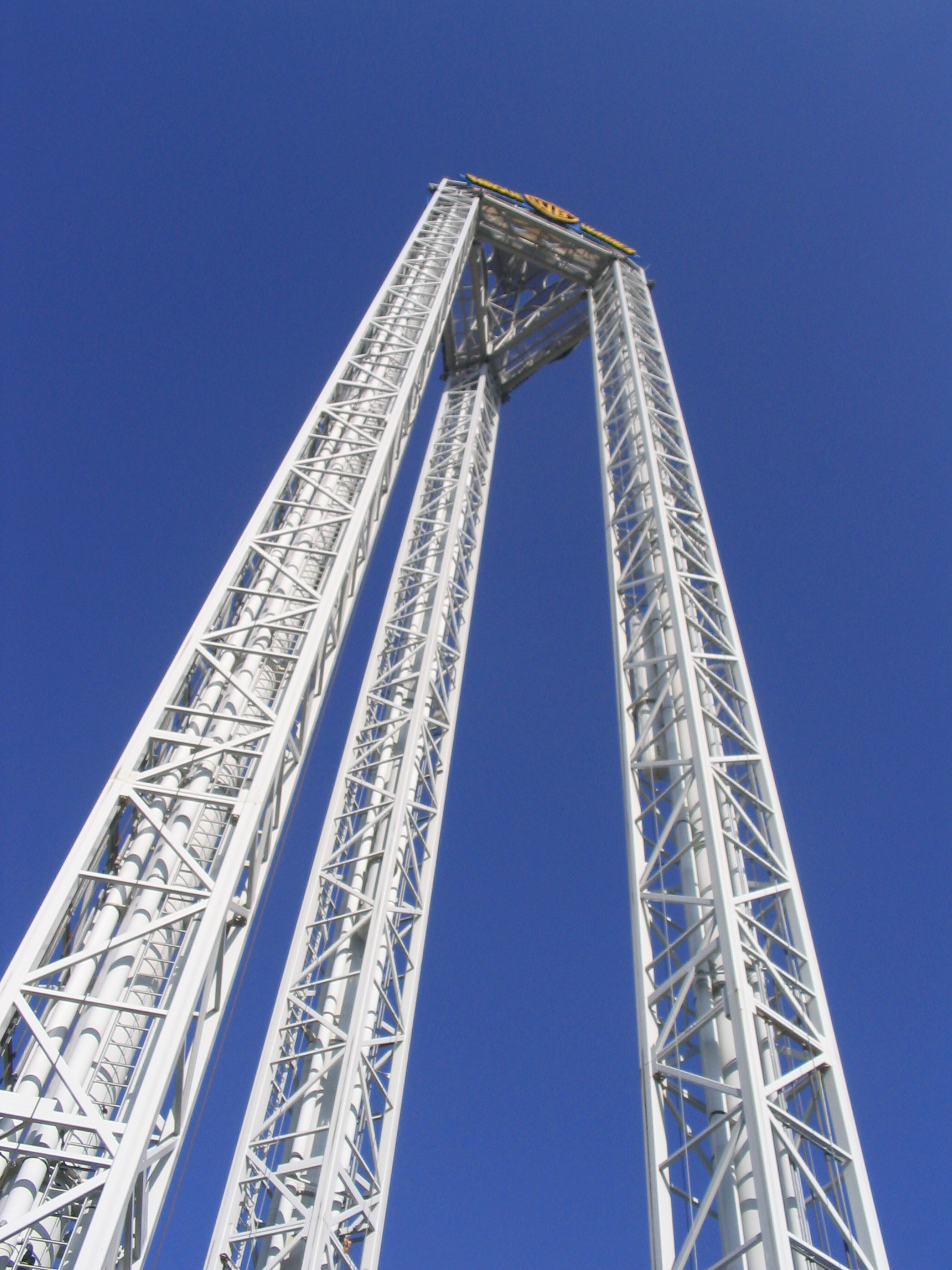 La Venganza del Enigma, una atracción de 100 metros de altura ubicada en el Parque Warner (Madrid, España).